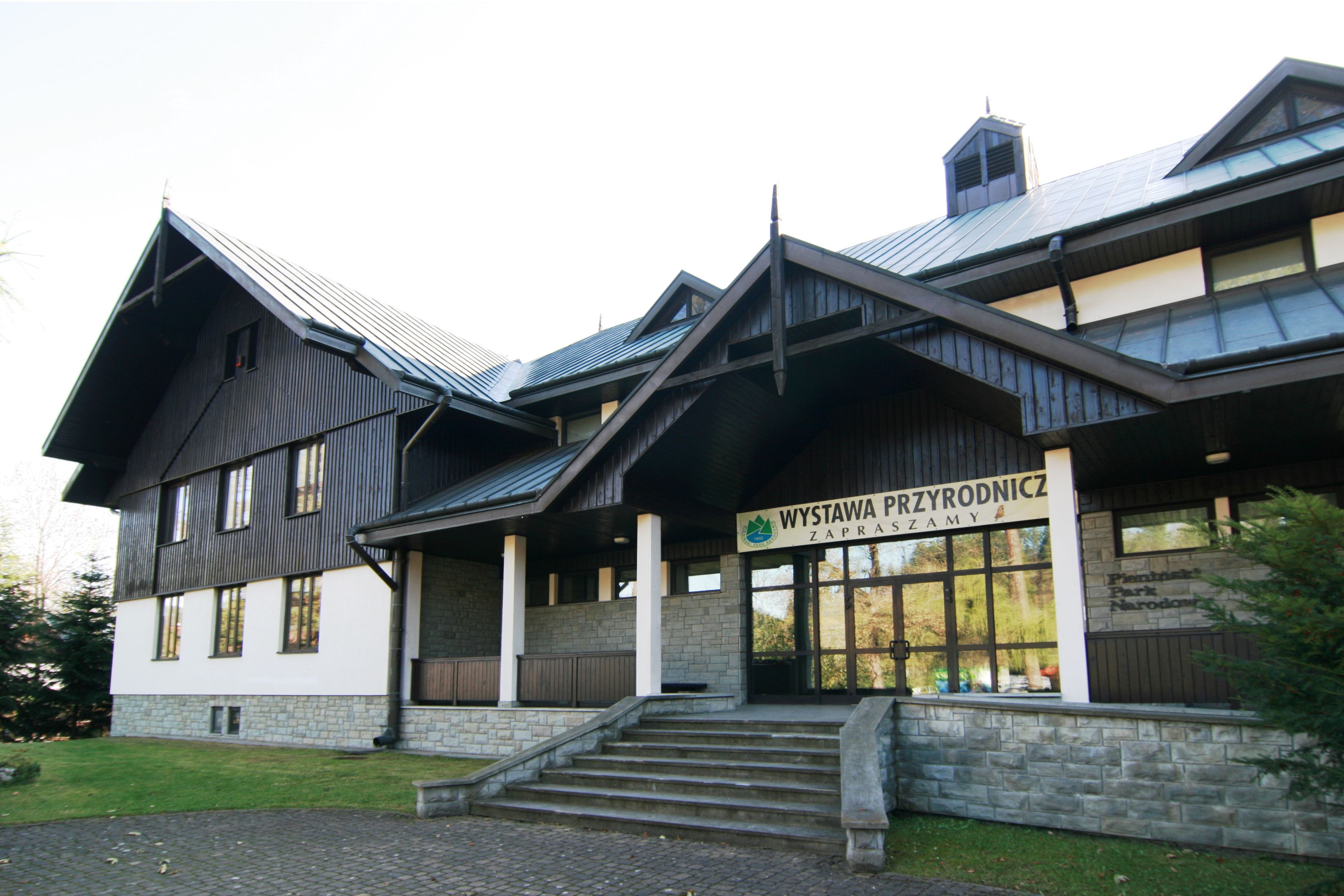 Siedziba Dyrekcji Pienińskiego Parku Narodowego przy ul. Jagiellońskiej 107B - widok od strony ulicy na wejście do muzeum